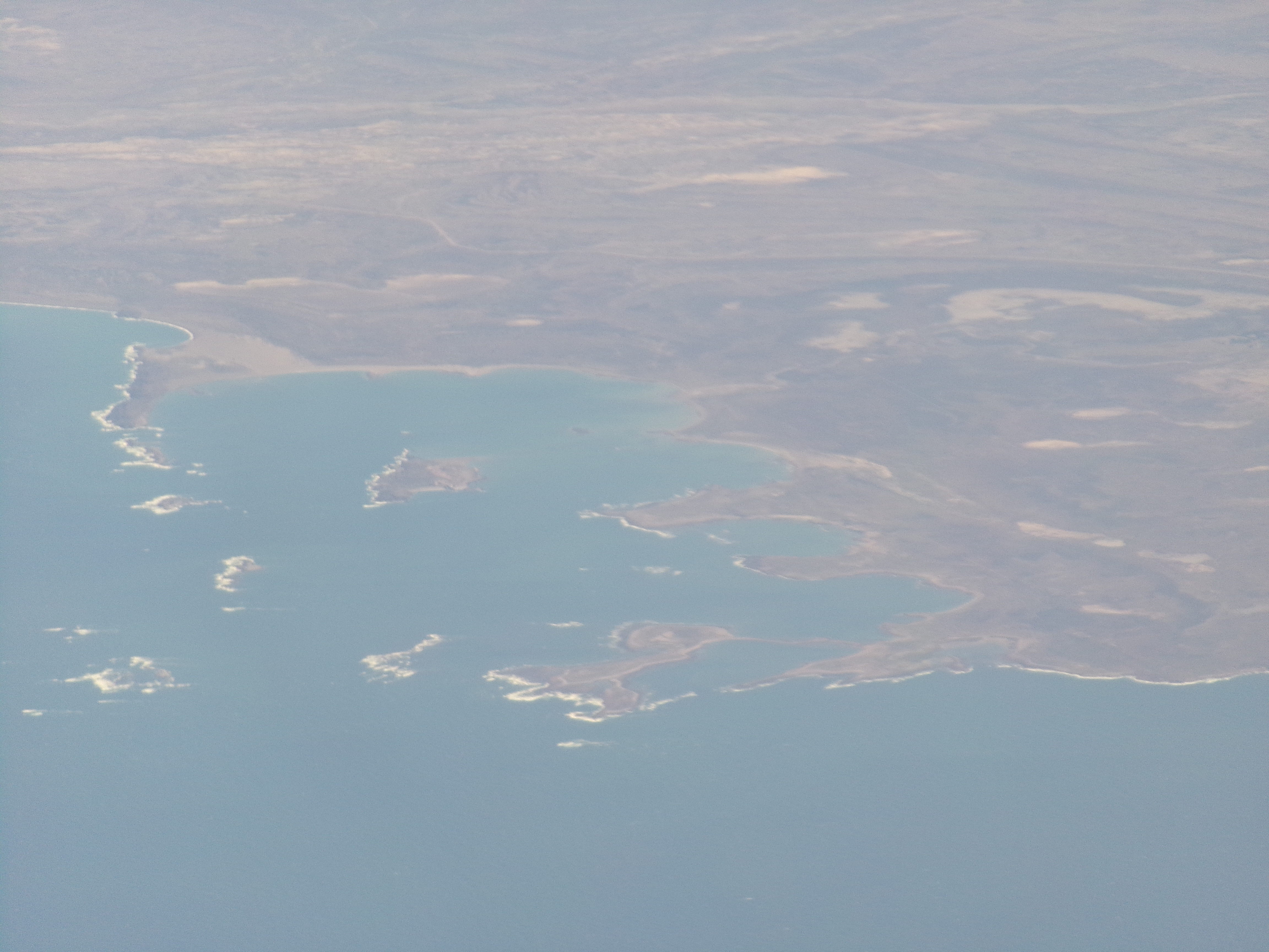 Área de Punta Tafor e Islas Lobos, Chubut